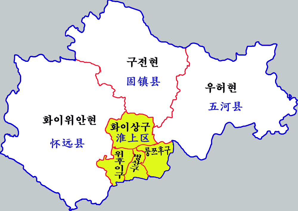 벙부시 현급구역